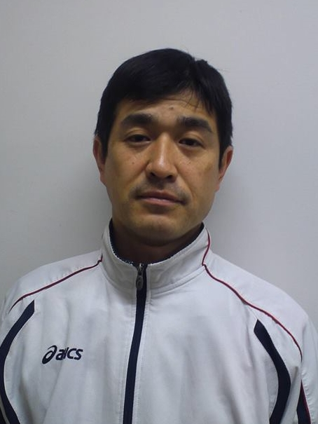 嶋村 健太 1987年度 二輪ロードレース 全日本ジュニア250クラス 年間王者 1992年 ル・マン24時間 出場 カーナンバー36 160周 チェッカーを受けた非完走車